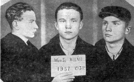 Фотаздымкі Максіма Танка ў турме Лукішкі, 1932 г.